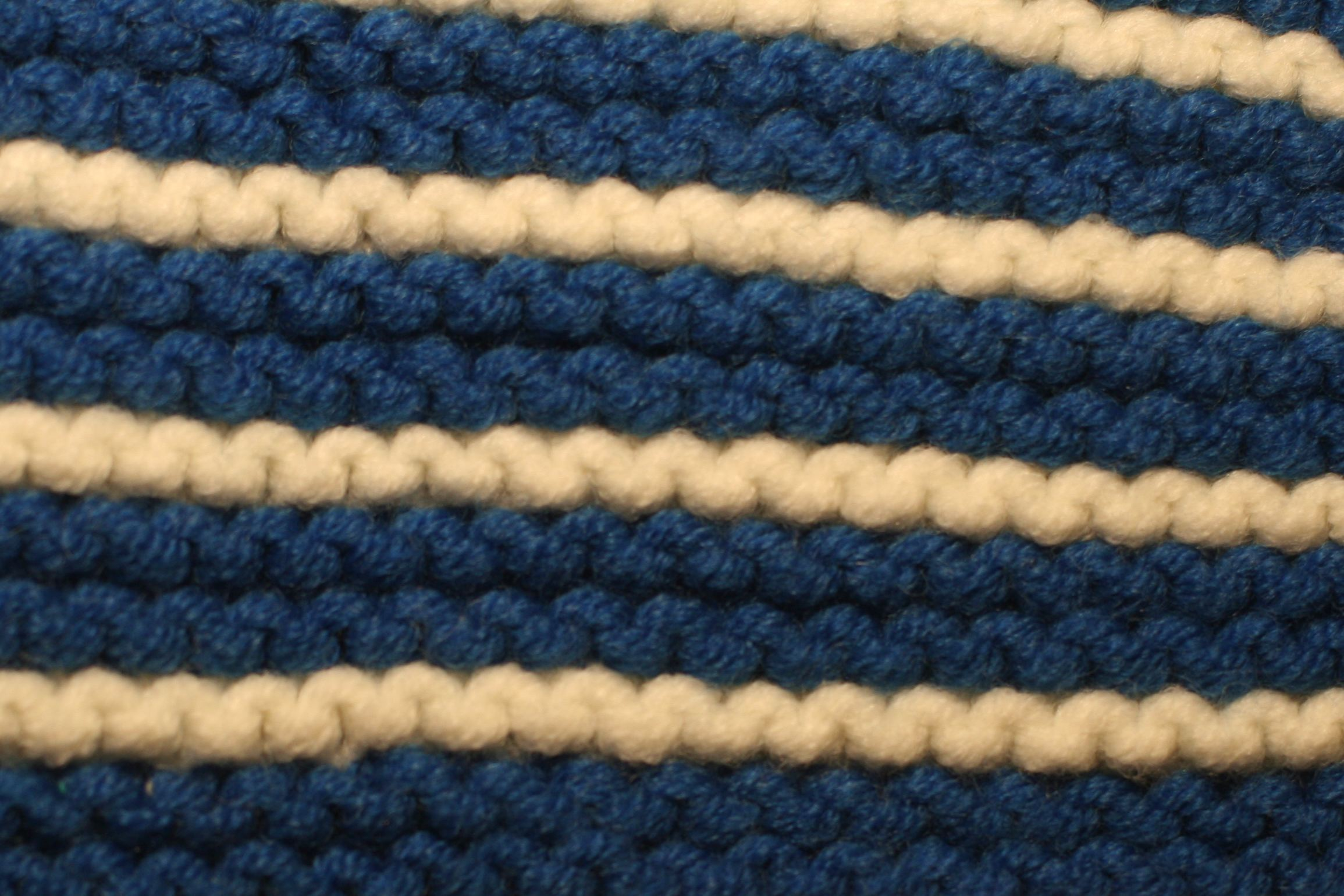 Garter stitch (knitting)